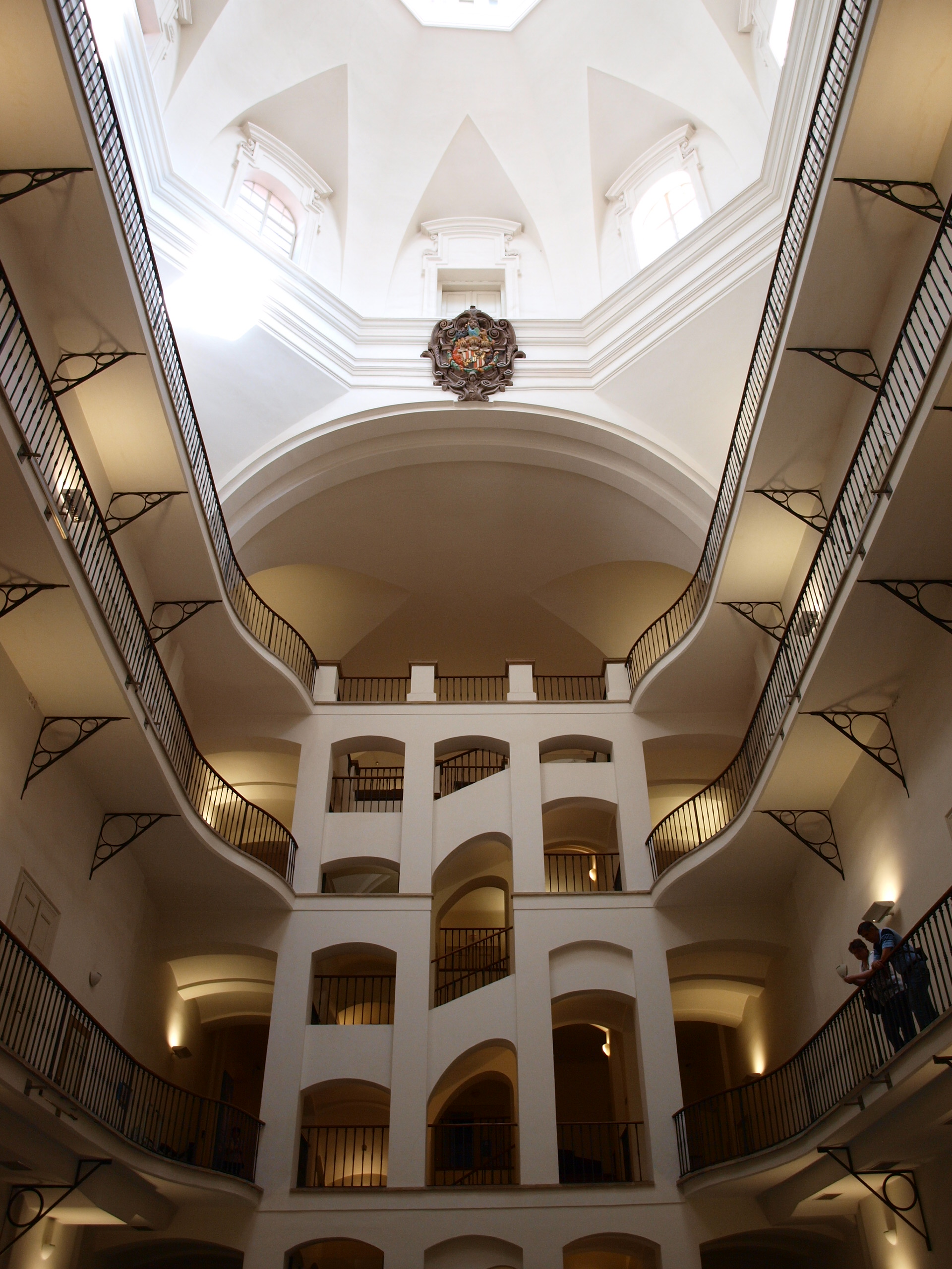 Budova Českého muzea hudby